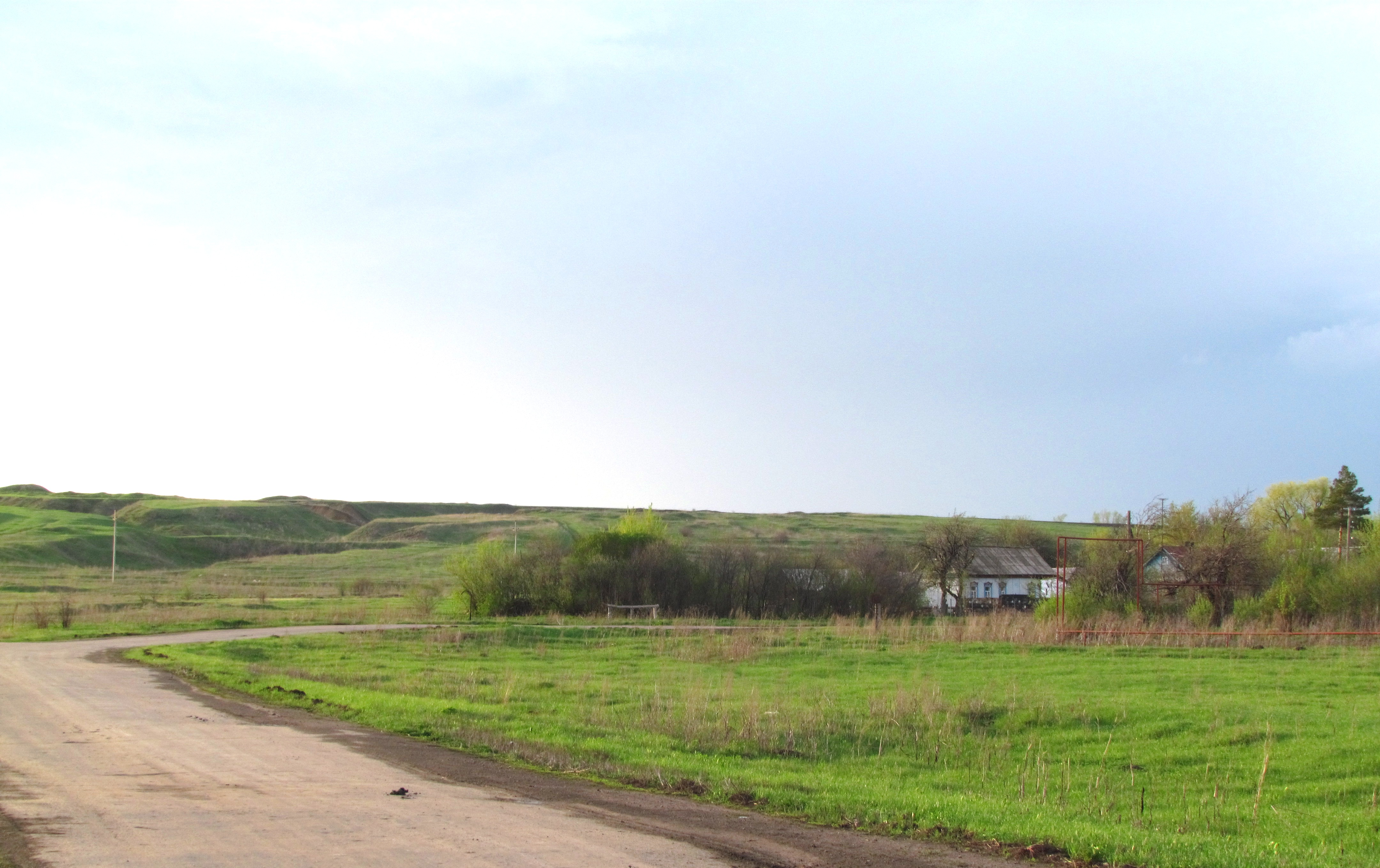 Entrance to Latyshovka st. in Sosnovka (Bekovo)